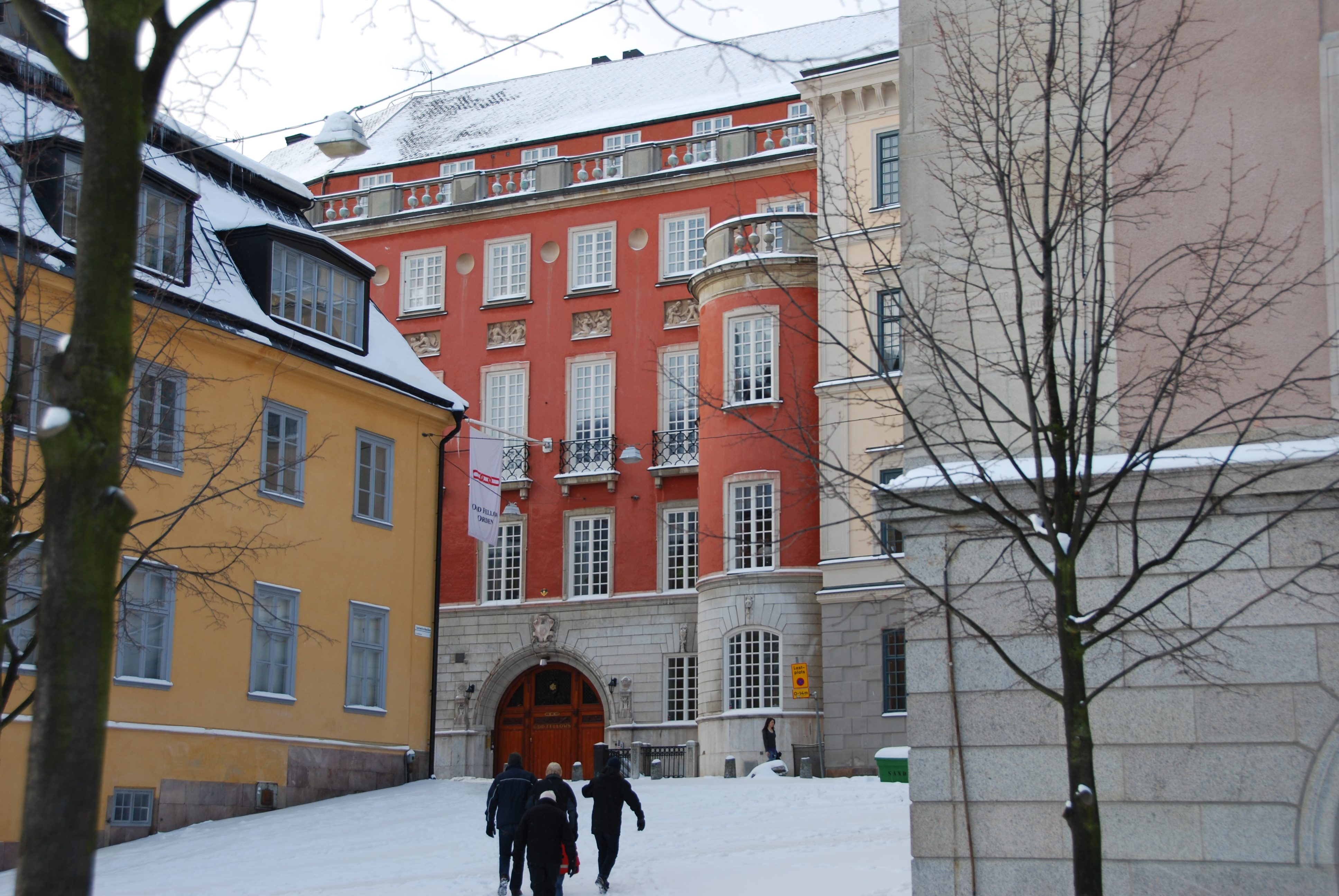 Lantmäteribacken, Stockholm. I bakgrunden syns det röda huset på Västra Trädgårdsgatan 11A, det är gatufasaden på det Banérska palatset, som sedan 1922 disponeras av Oberoende Odd Fellow Orden.